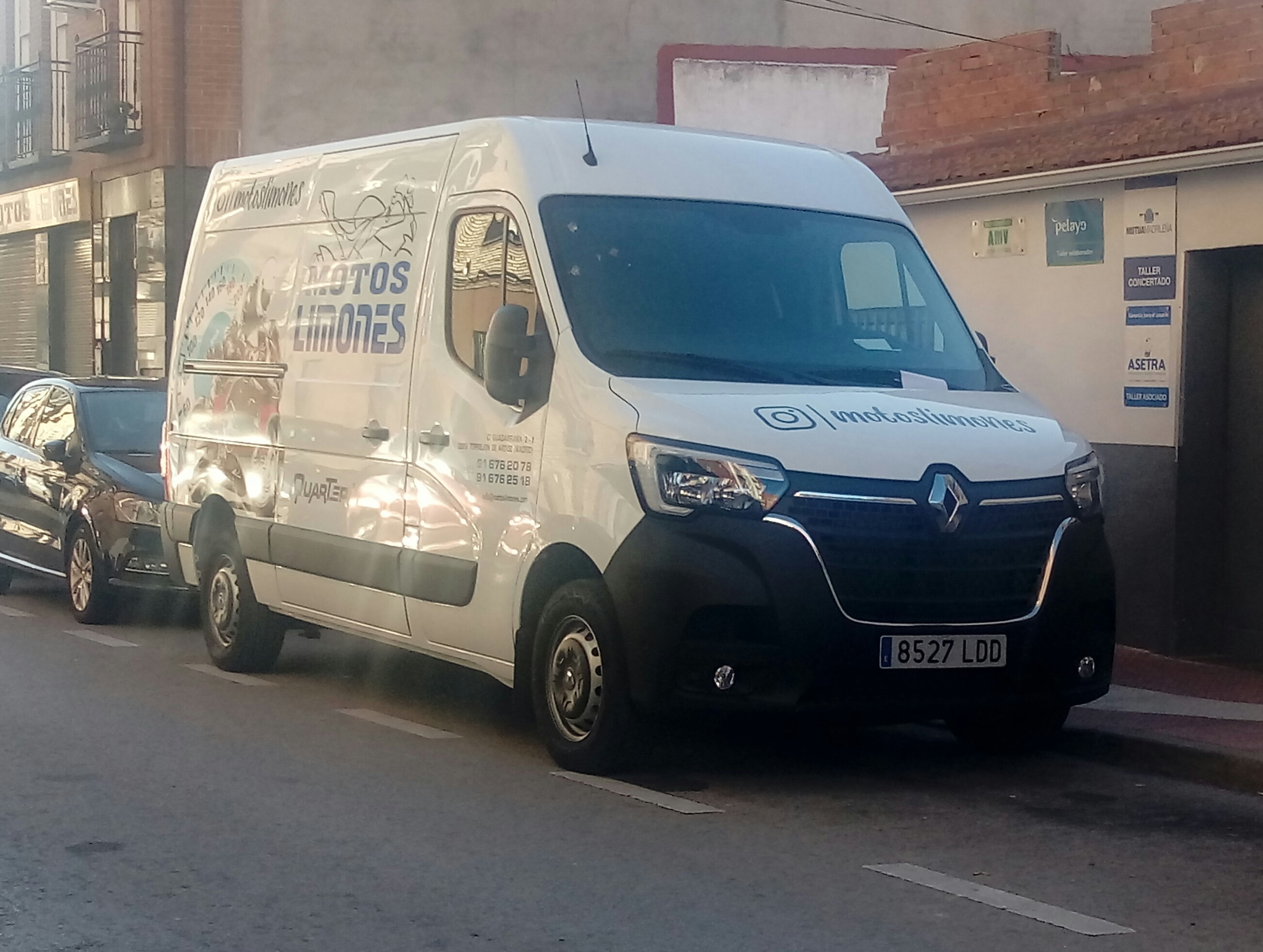 Nuevo Renault Master, fabricado desde 2019.